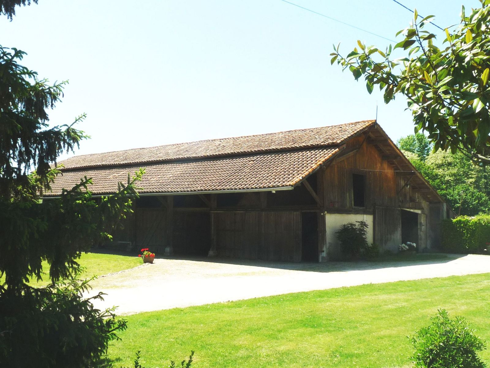 grange en bois à St-Aigulin (Charente-Maritime, France), typique des forêts de pins maritimes du Sud-Ouest (ici la Double)